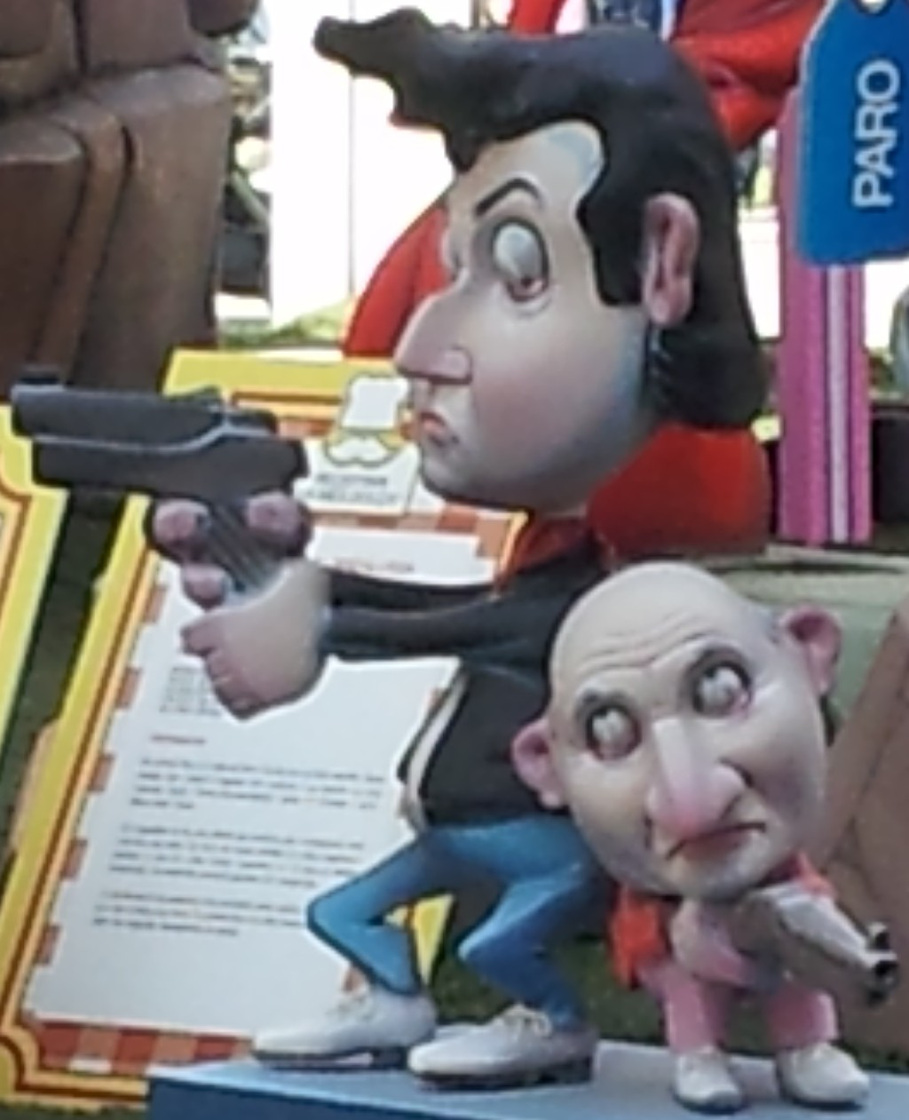 Andrés Pajares i Jesús Bonilla tal com eixien a la pel·li "Makinavaja".